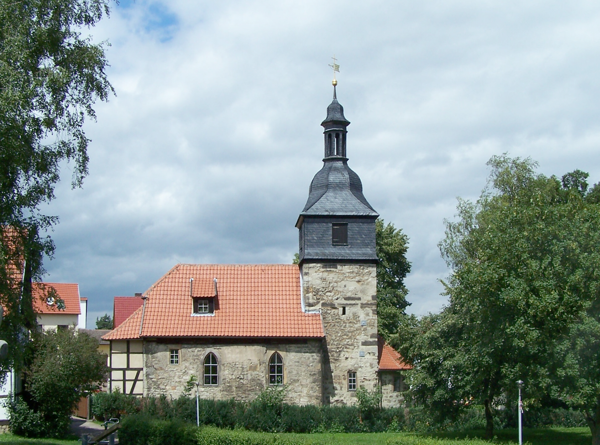 Die Dorfkirche von Weingarten im Landkreis Gotha. Ansicht vom Festplatz.